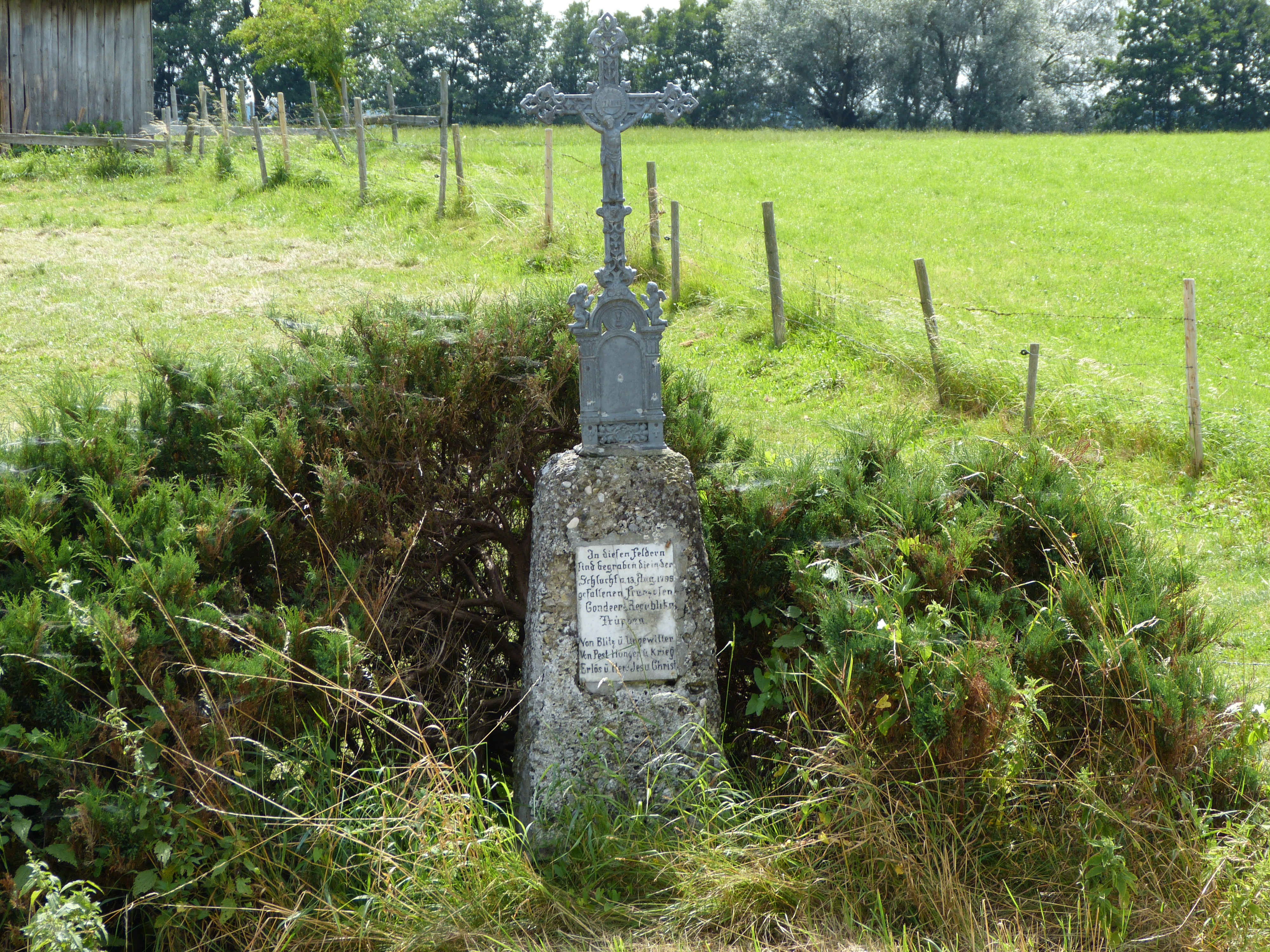 Franzosenkreusz in Oberkammlach, Landkreis Unterallgäu, Bayern